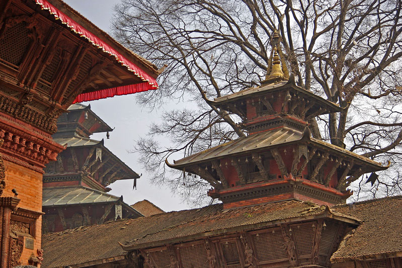 Hanuman-dhoka Durbar Square, Kathmandu, Nepal